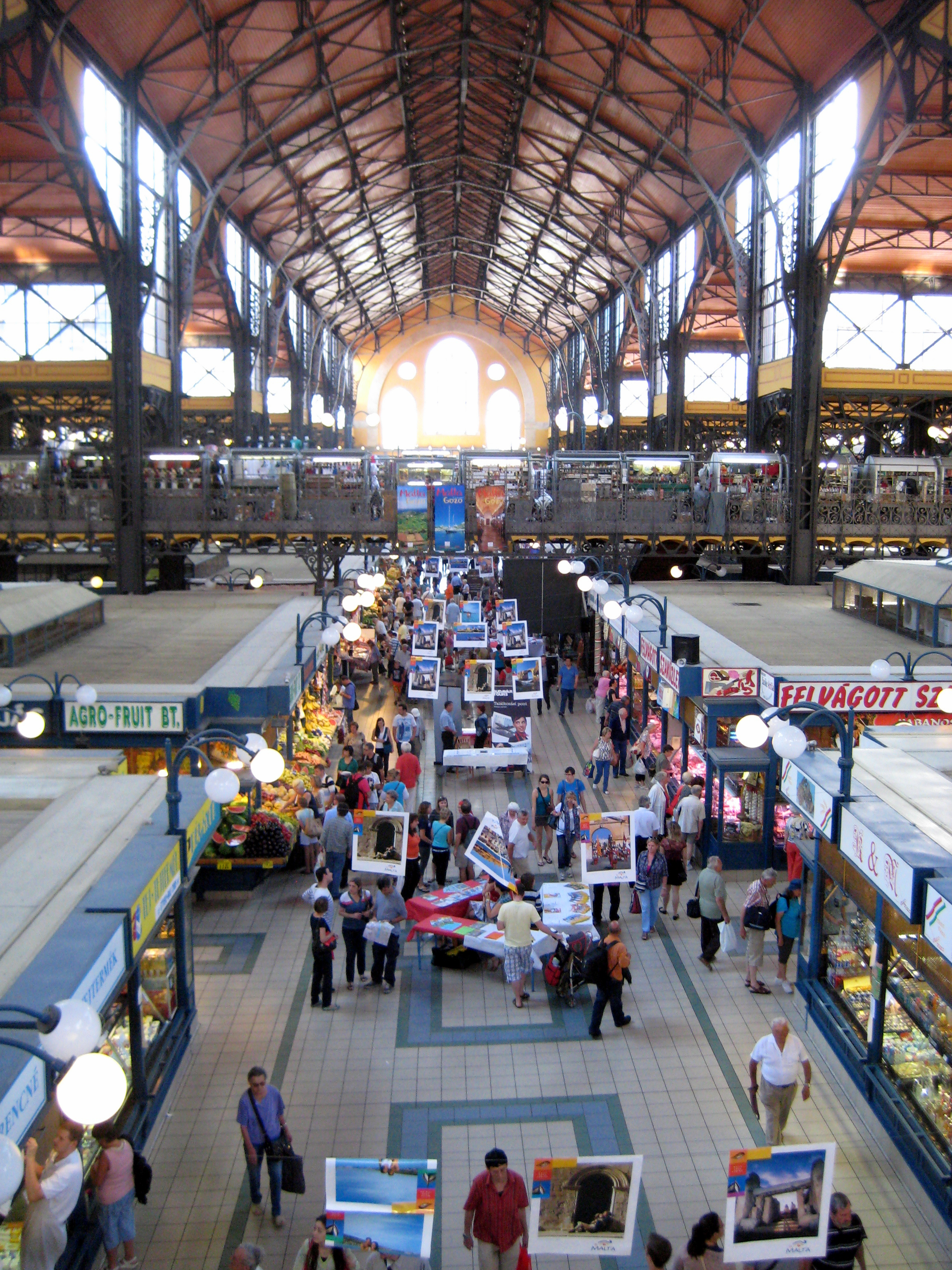 Mercato centrale di Budapest